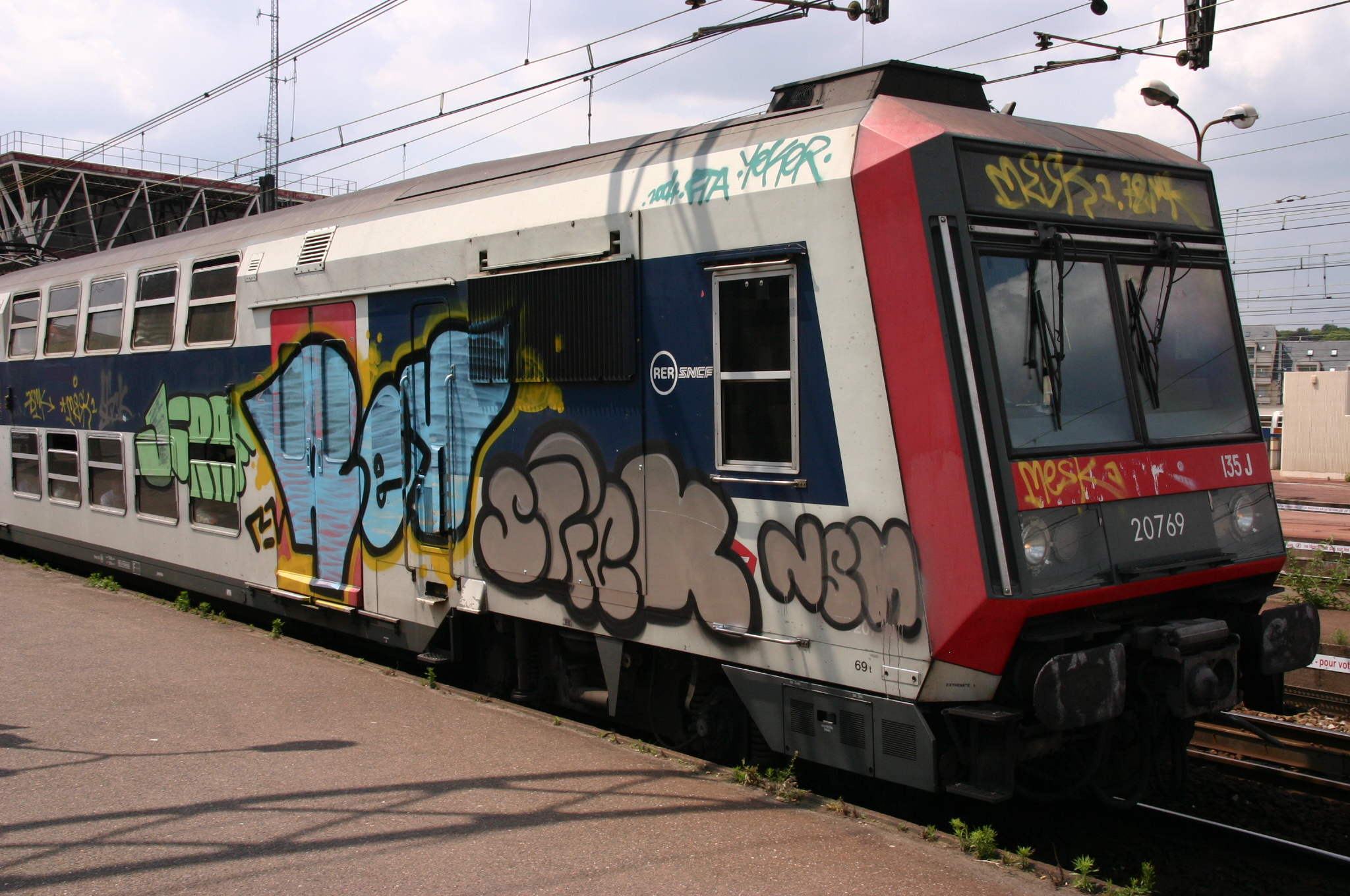 Gare de Juvisy, Juvisy-sur-Orge, département l'Essonne, France